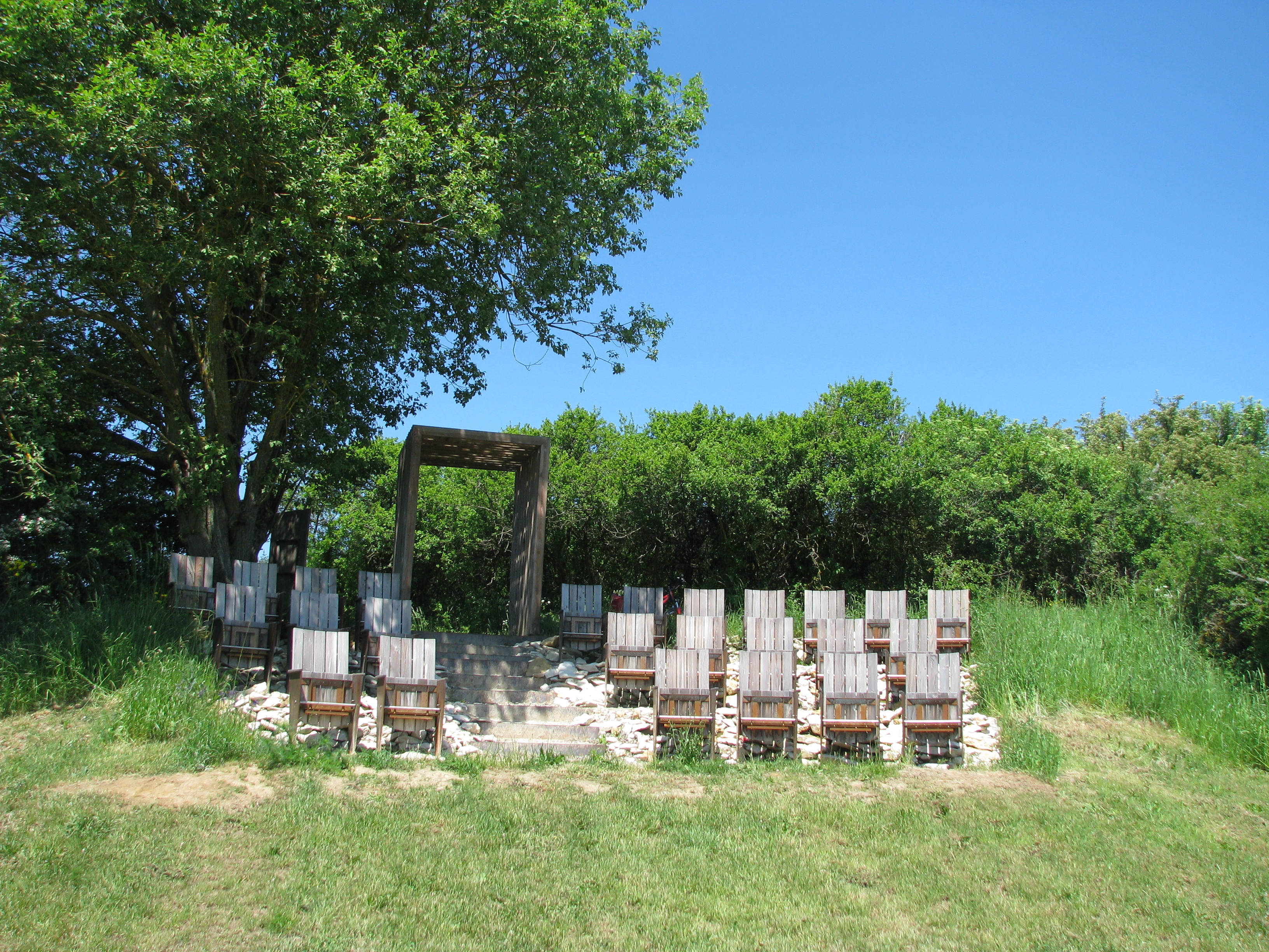 Hilzhofen (Pilsach NM), Juradistl-Landschaftskino, Sitzreihen